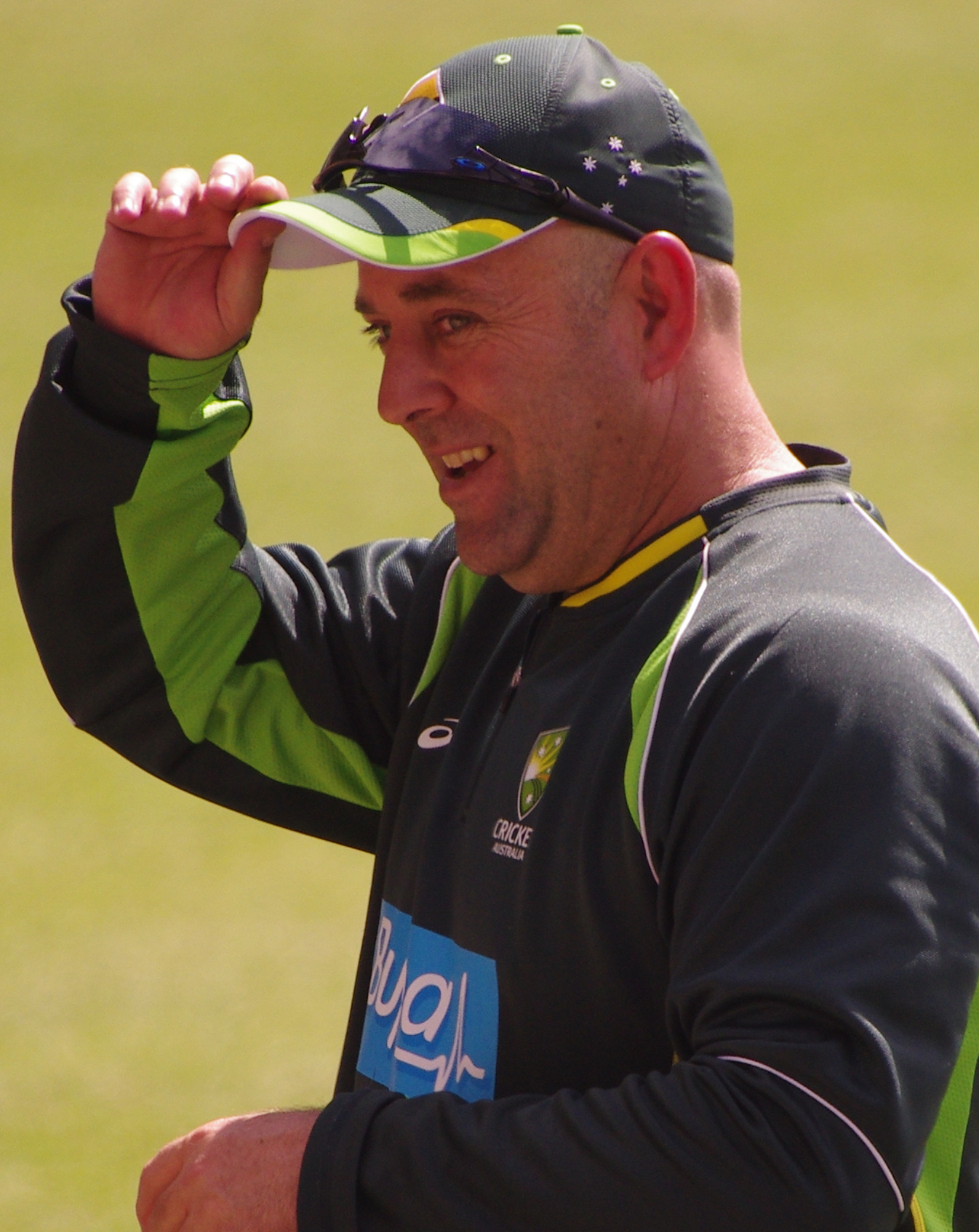 Darren Lehmann